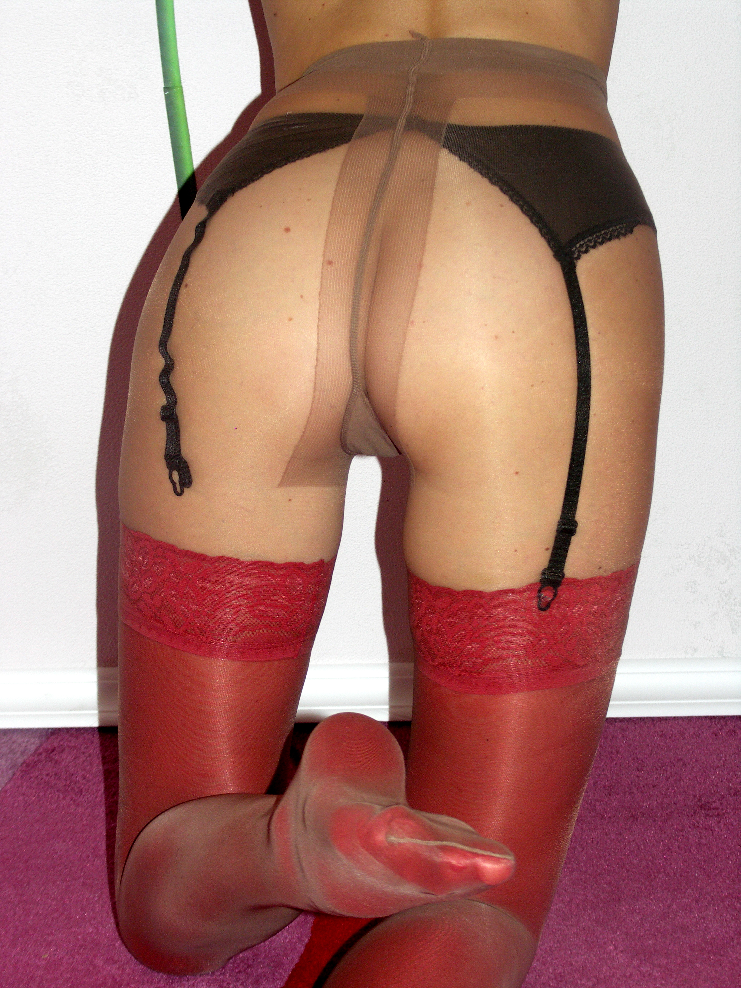 Braune Nylonstrumpfhose mit Hygienezwickel und darunter rote Straps-Nylonstrümpfe von einer Strapsgürtel gehalten. Detailansicht von hinten